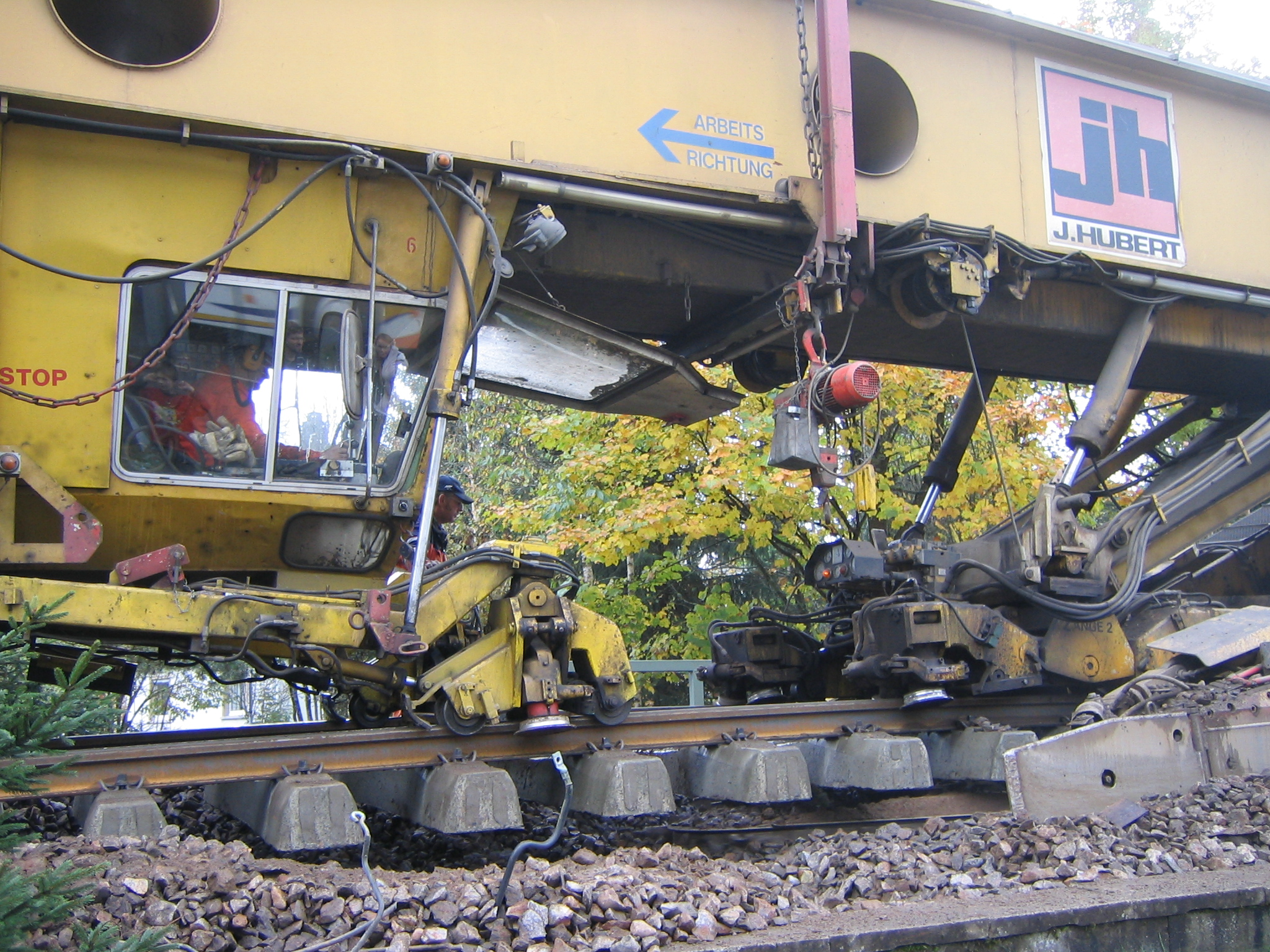 Hubert RM 800 - Hochleistungsbettungsreinigungsmaschine für Gleise im Einsatz kurz vor dem deutschen Bahnhof Titisee